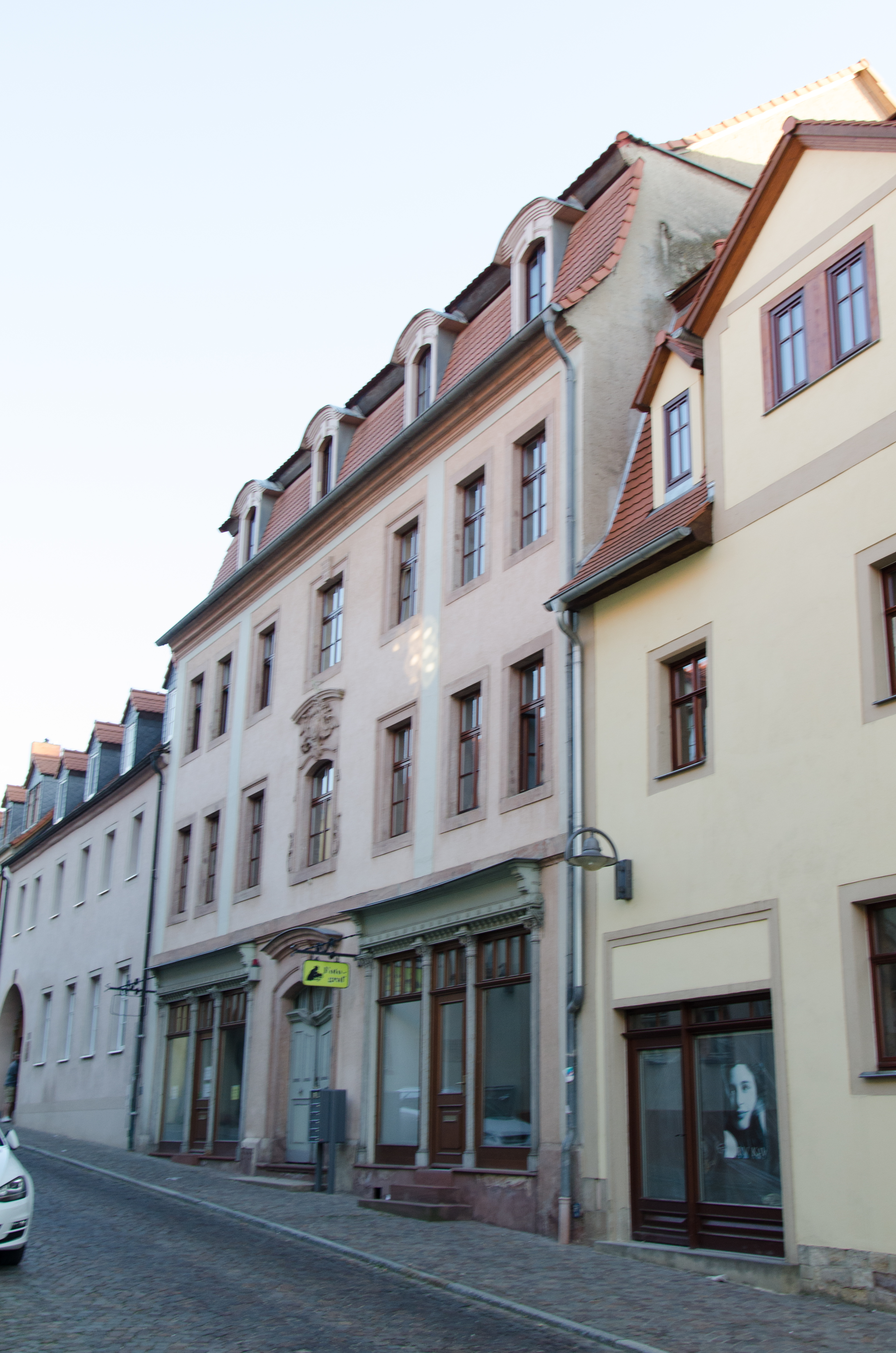 Querfurt, Nebraer Straße 18